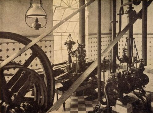 Machine a vapeur de Laiterie des Bruyères de Schooten par Brasschaet